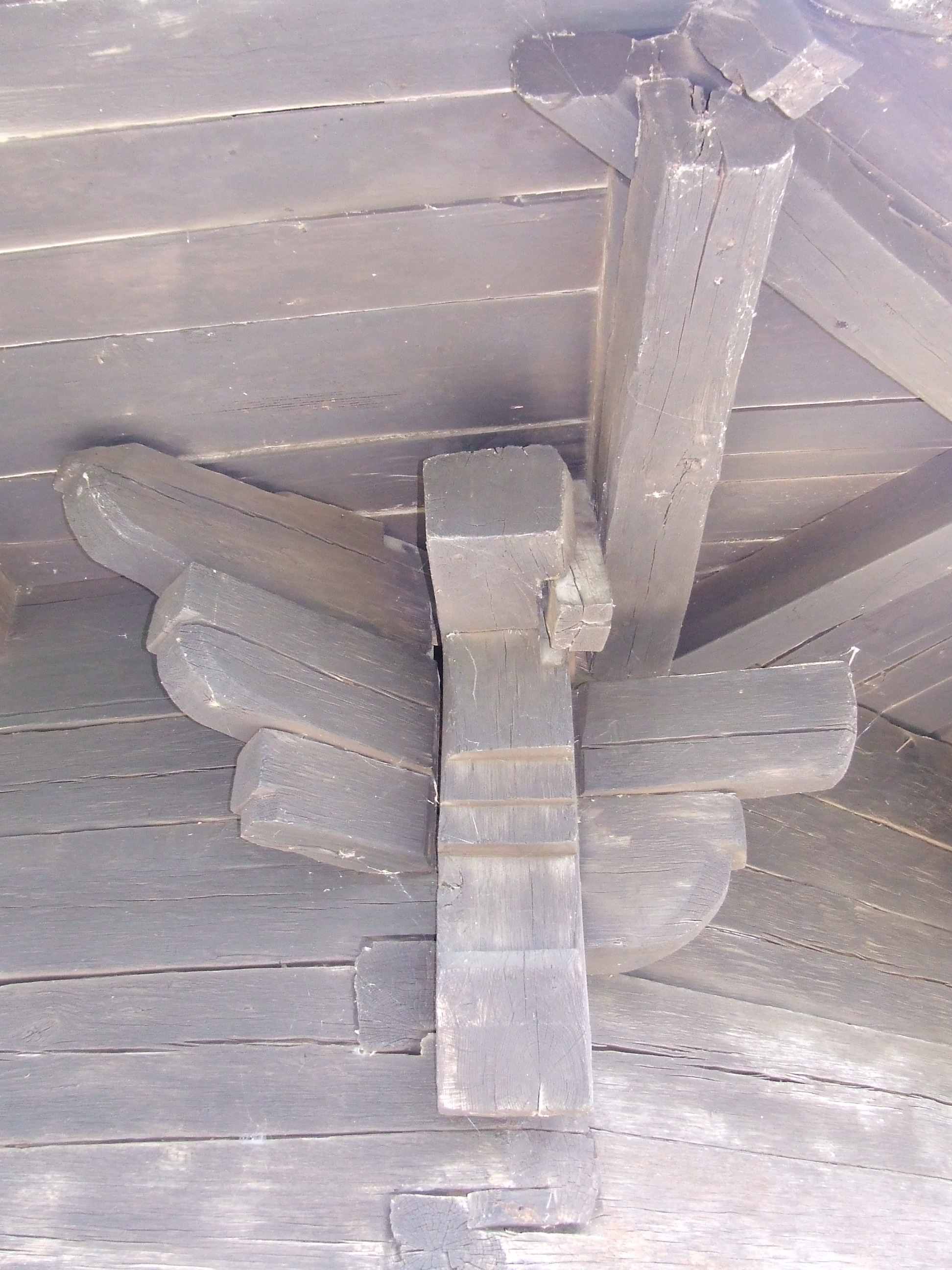 Biserica de lemn din Gălgău, judeţul Sălaj. Detaliu Autor: Bogdan Ilieş Data: mai 2007